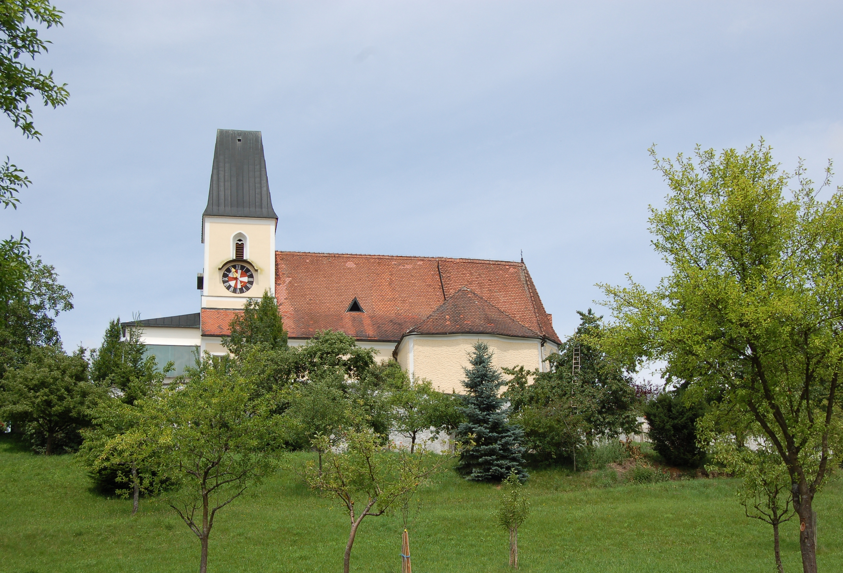 Die Pfarrkirche zum heiligen Martin in Walding (Oberösterreich).